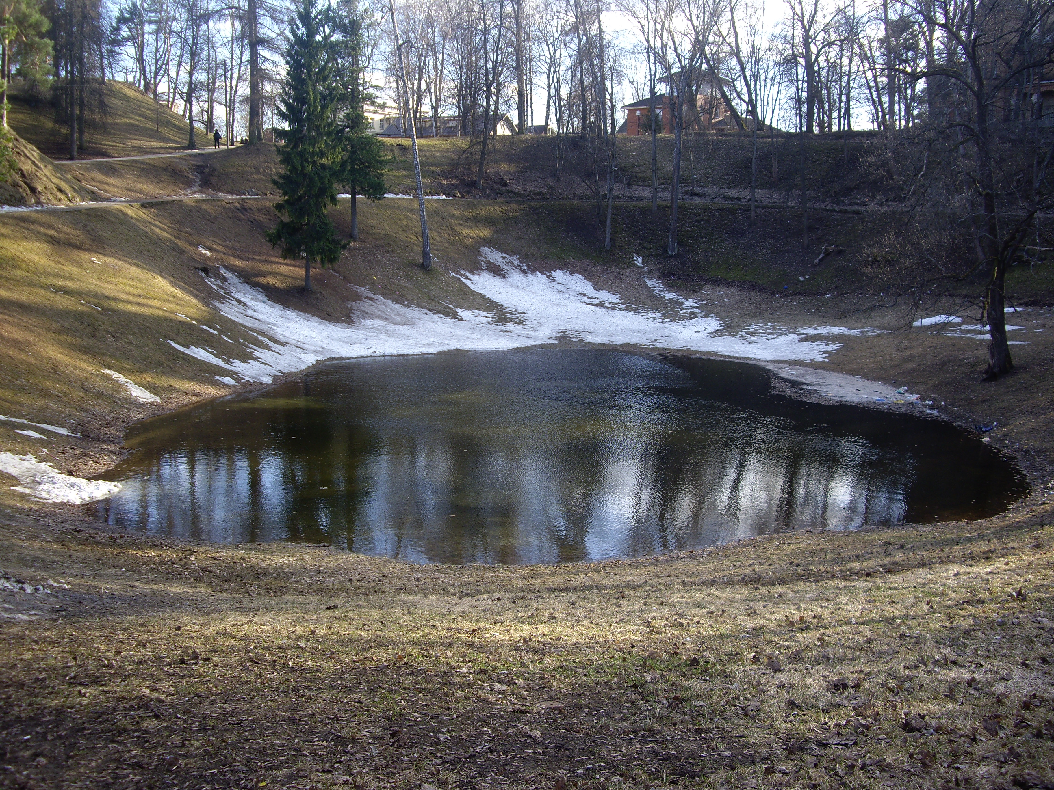 Kassitoome 2011. aasta kevadel